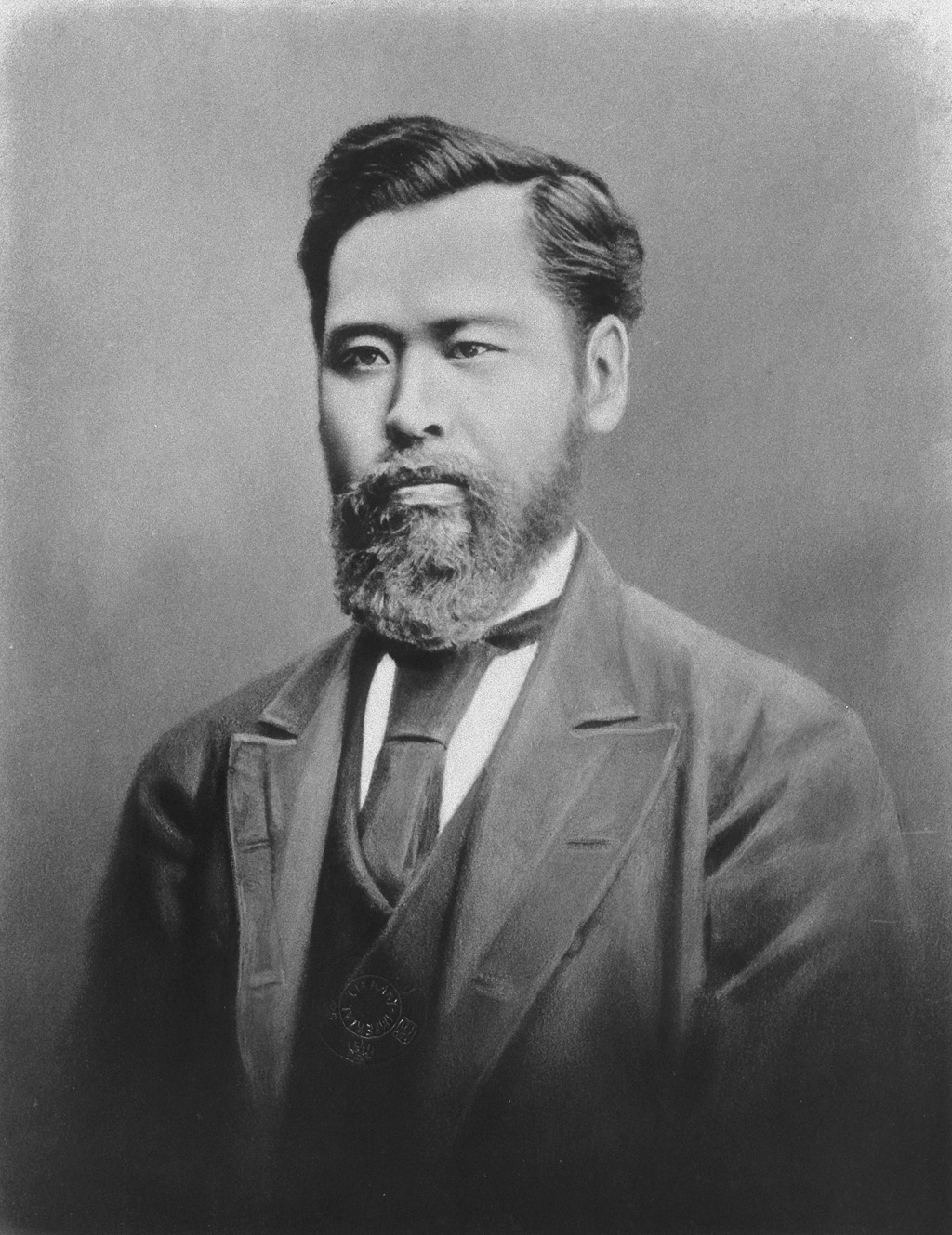 Portrait of Mori Arinori (森有礼, 1847 – 1889)